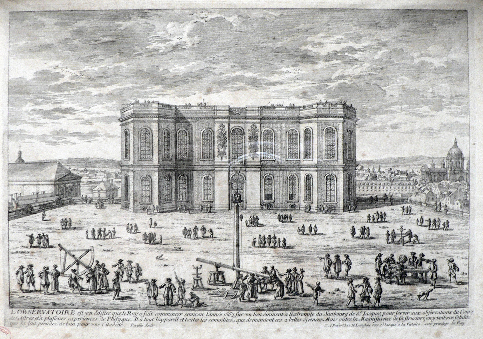 L' Observatoire royal de Paris, à son origine.